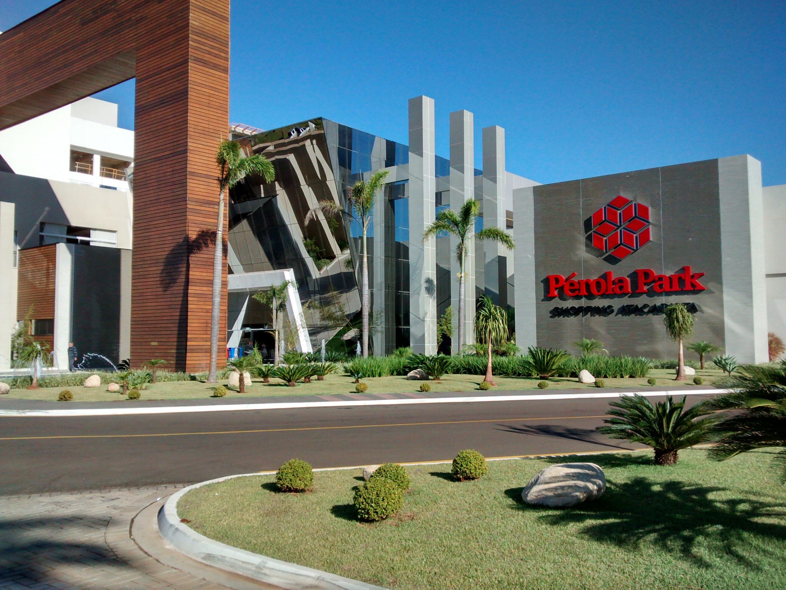 Perola Park Shopping atacadista.